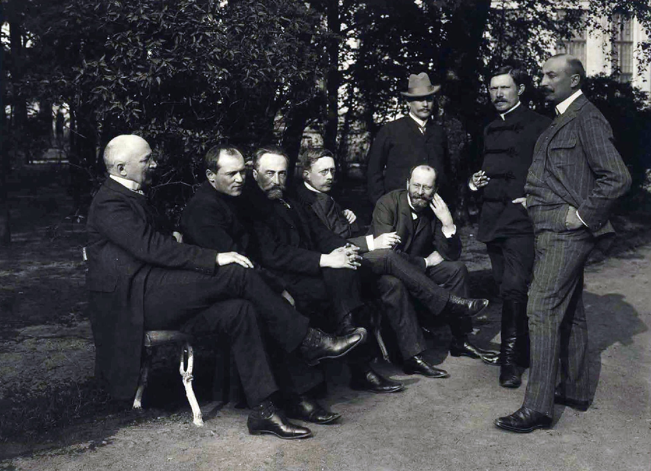 Депутаты 2-й Государственной Думы Российской империи. Польское коло. Сидят: Л.С. Путткамер Л.К. Родзевич М.Г. Хелховский Л.Ф. Лубенский М.А. Венславский Стоят: В.В. Жуковский М.К. Дзюржинский С.А. Ванькович